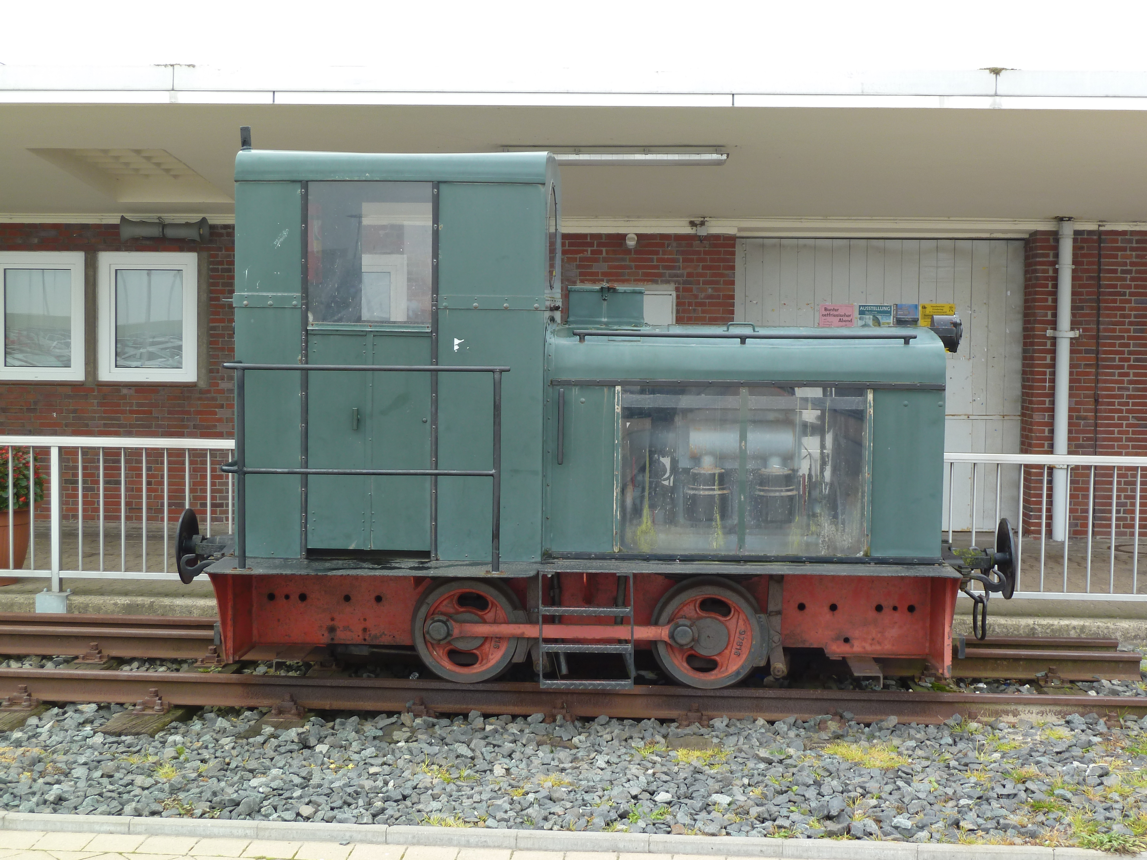 Lok 2 Typ OMZ 122F (Deutz 36708/1940 , B dm) der Inselbahn Spiekeroog als Denkmal in Harlesiel 11.Oktober 2010